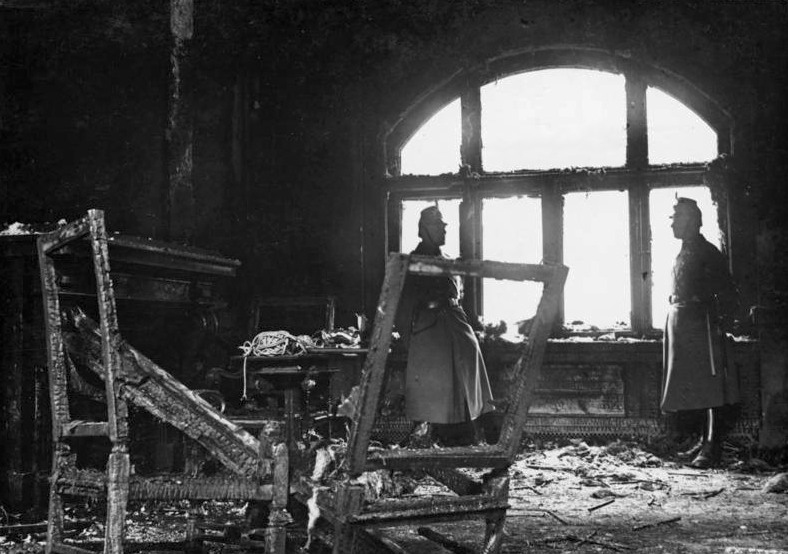 Der Plenar-Sitzungssaal des deutschen Reichstags, durch Brandstiftung vernichtet! Die Reichspräsidenten- und ehemalige Hofloge im Plenar-Sitzungssaal des deutschen Reichstags, nach der vollständigen Vernichtung. Im Vordergrund der verkohlte Ehrensitz des Reichspräsidenten.